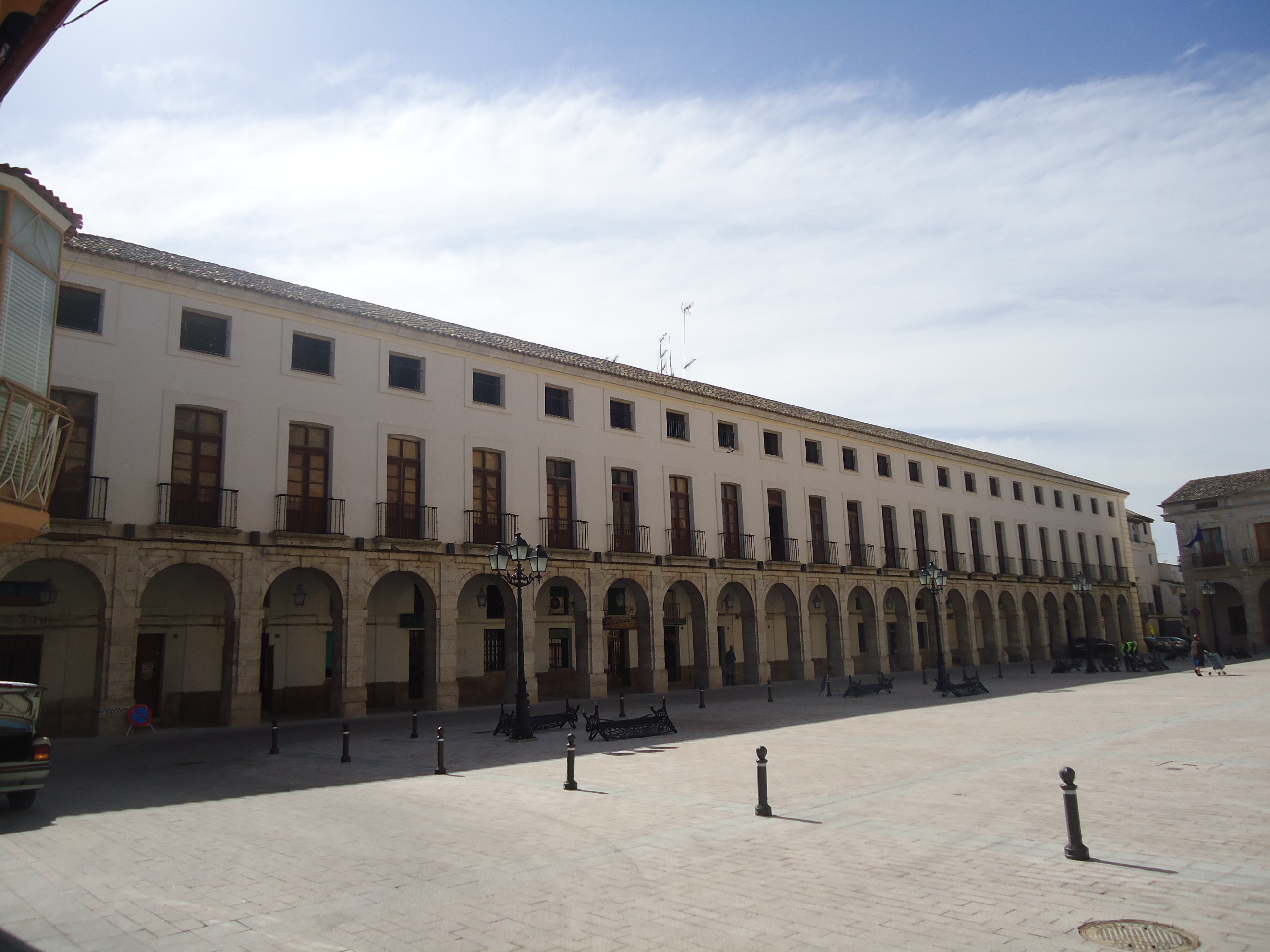 Palacio del arzobispo Alonso Carrillo de Acuña en Yepes